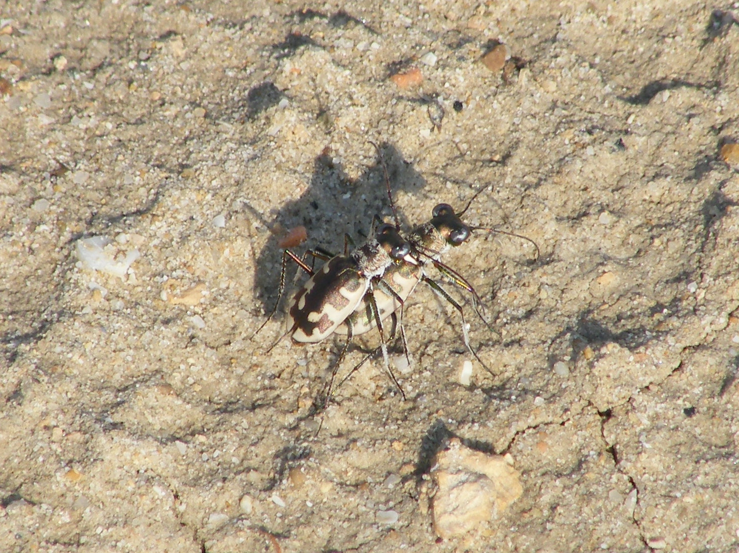 Cephalota litorea goudotiSaline di Cagliari